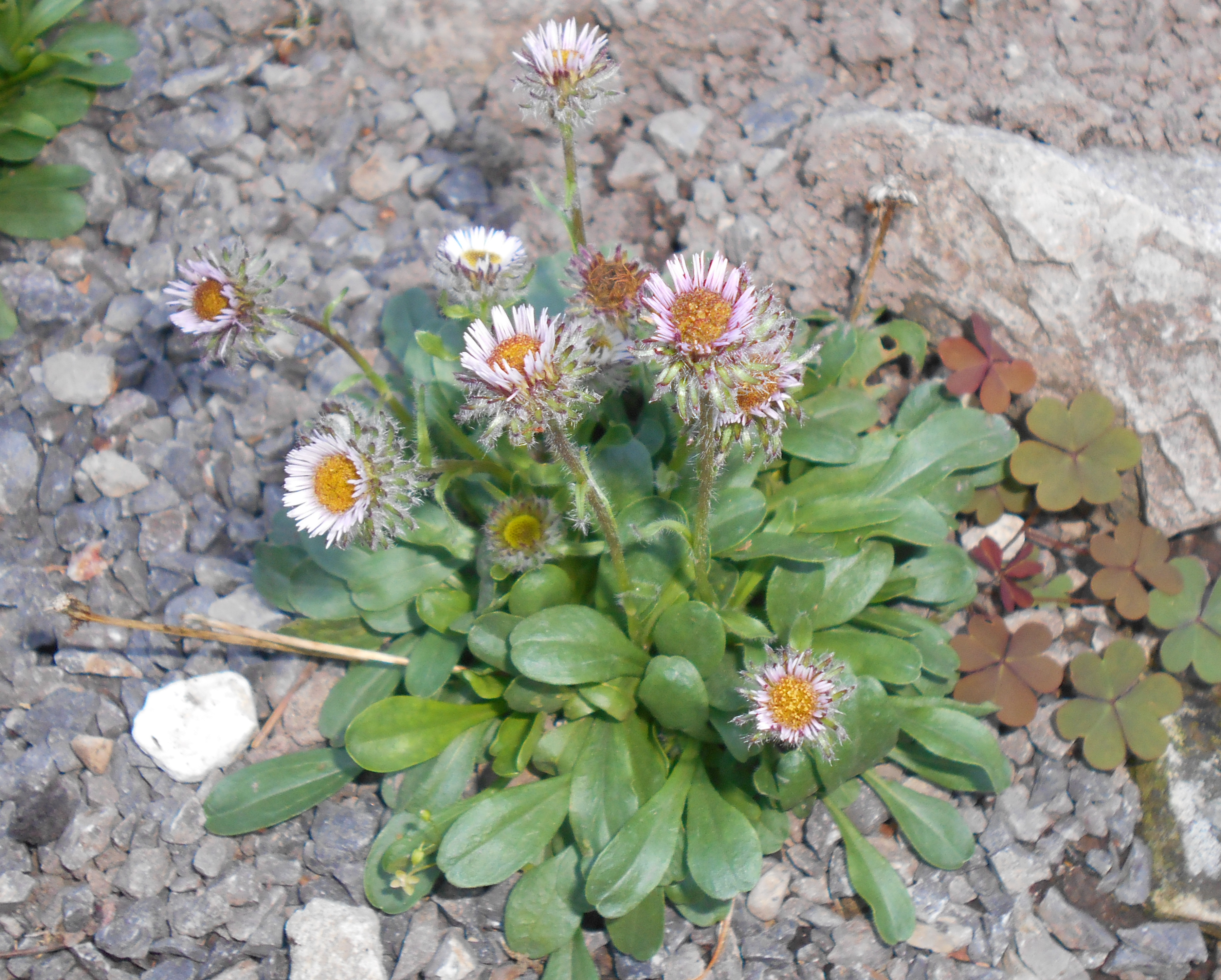 Przymiotno jednokoszyczkowe (Erigeron uniflorus), Ogród Botaniczny UMCS w Lublinie